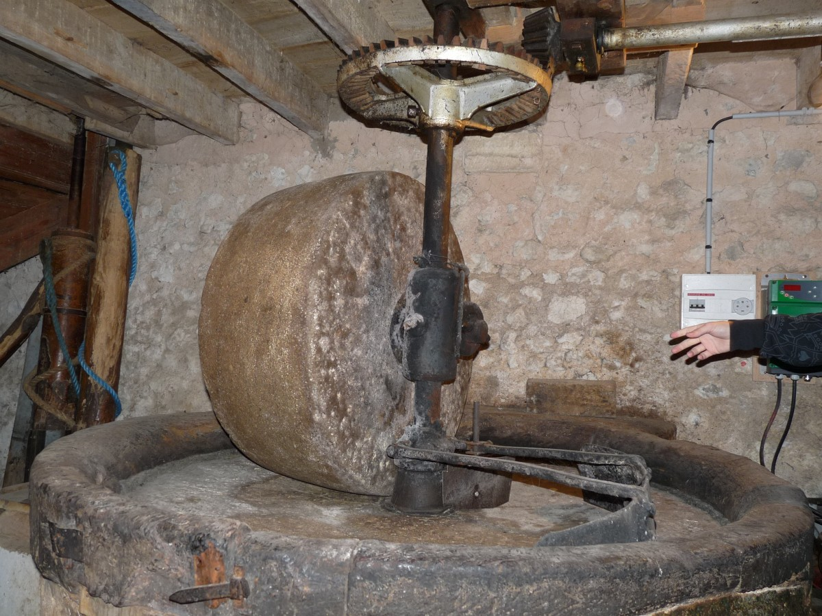 Meule pour broyer les noix, moulin Sartier, Salles-Lavalette, Charente, France